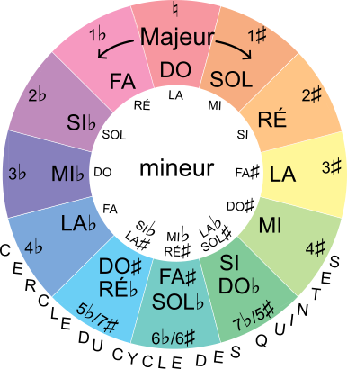 Le cercle des quintes